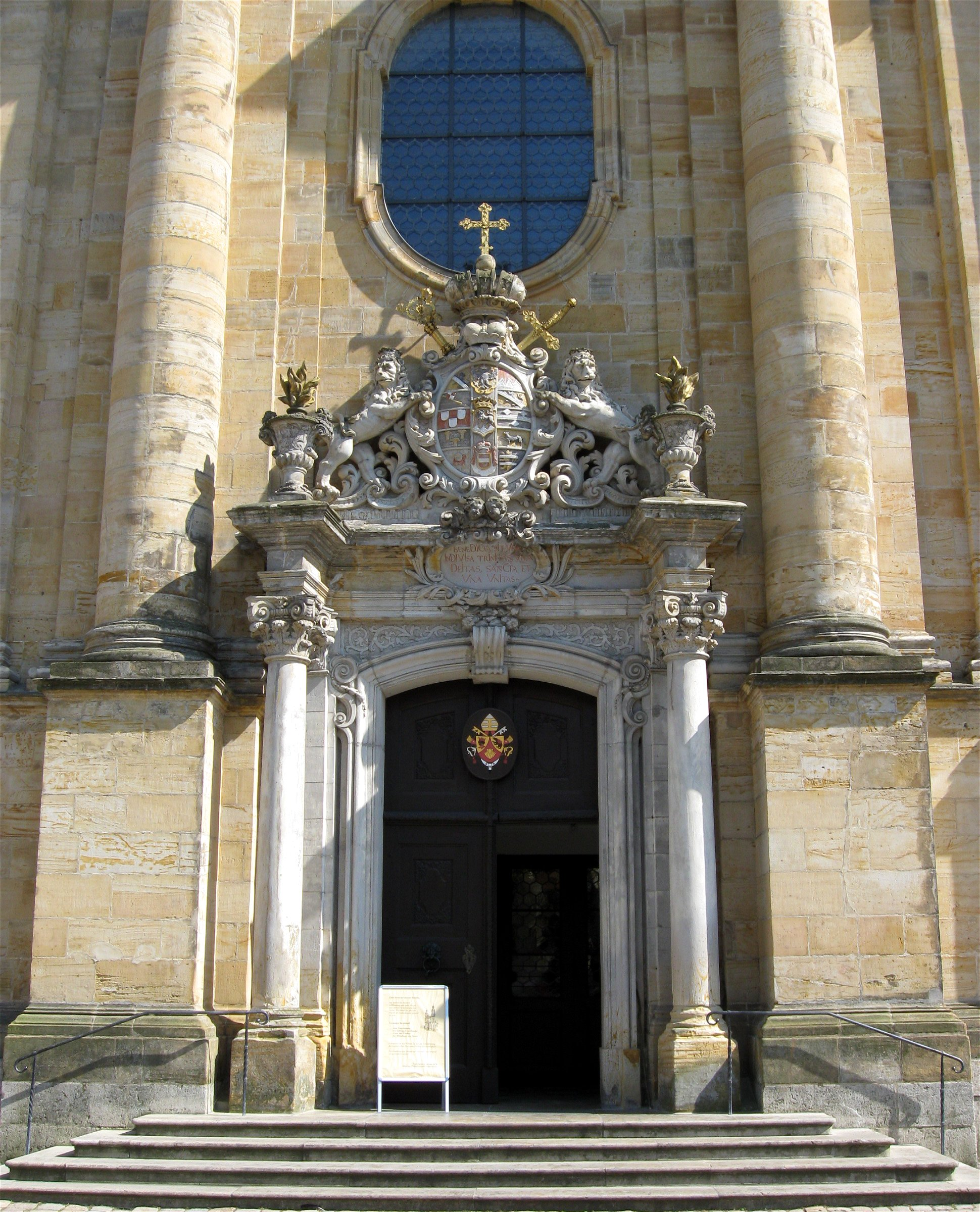 Dreifaltigkeitsbasilika in Gößweinstein, Portal